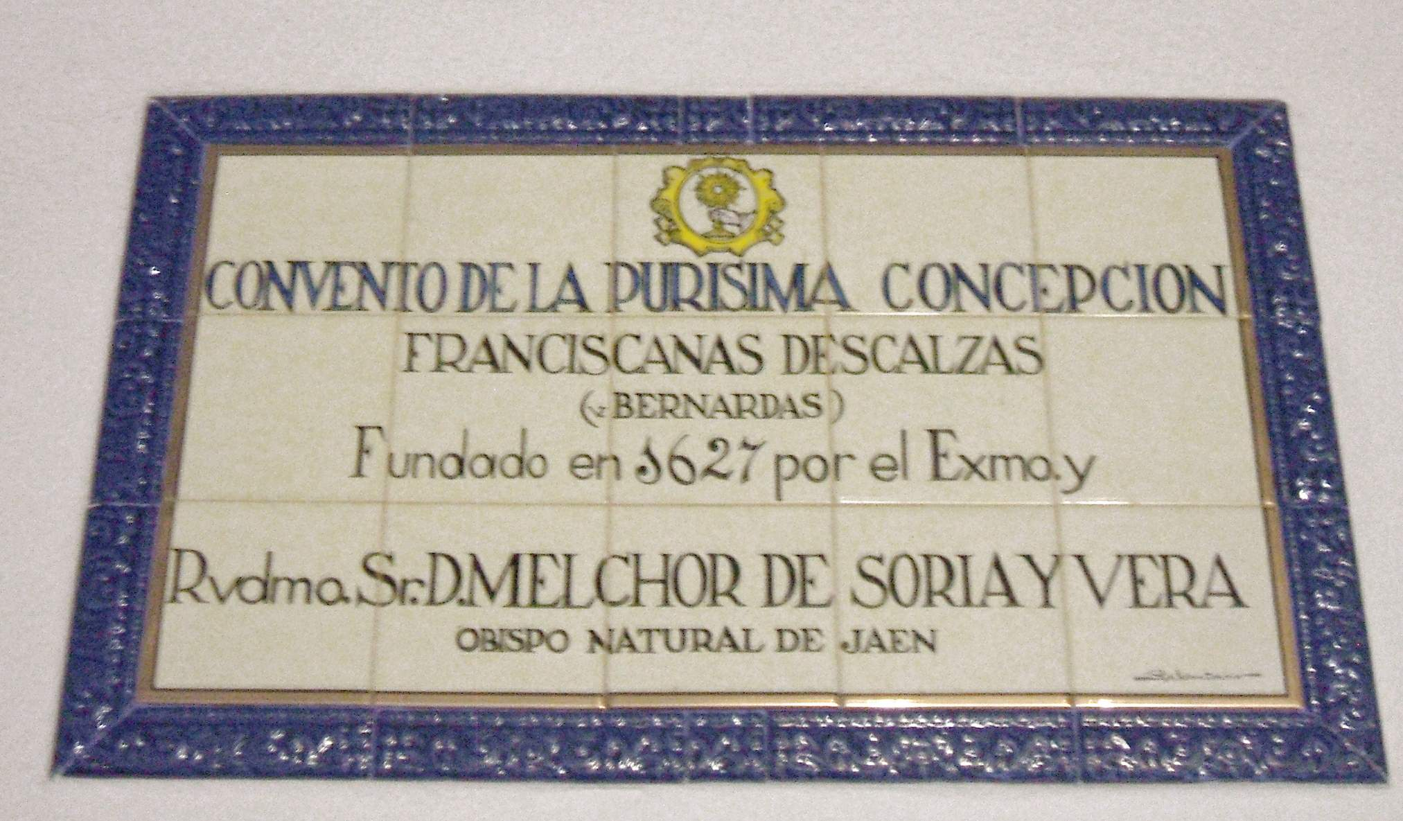 Convento de la Purísima Concepción de Franciscanas Descalzas (Bernardas), en Jaén